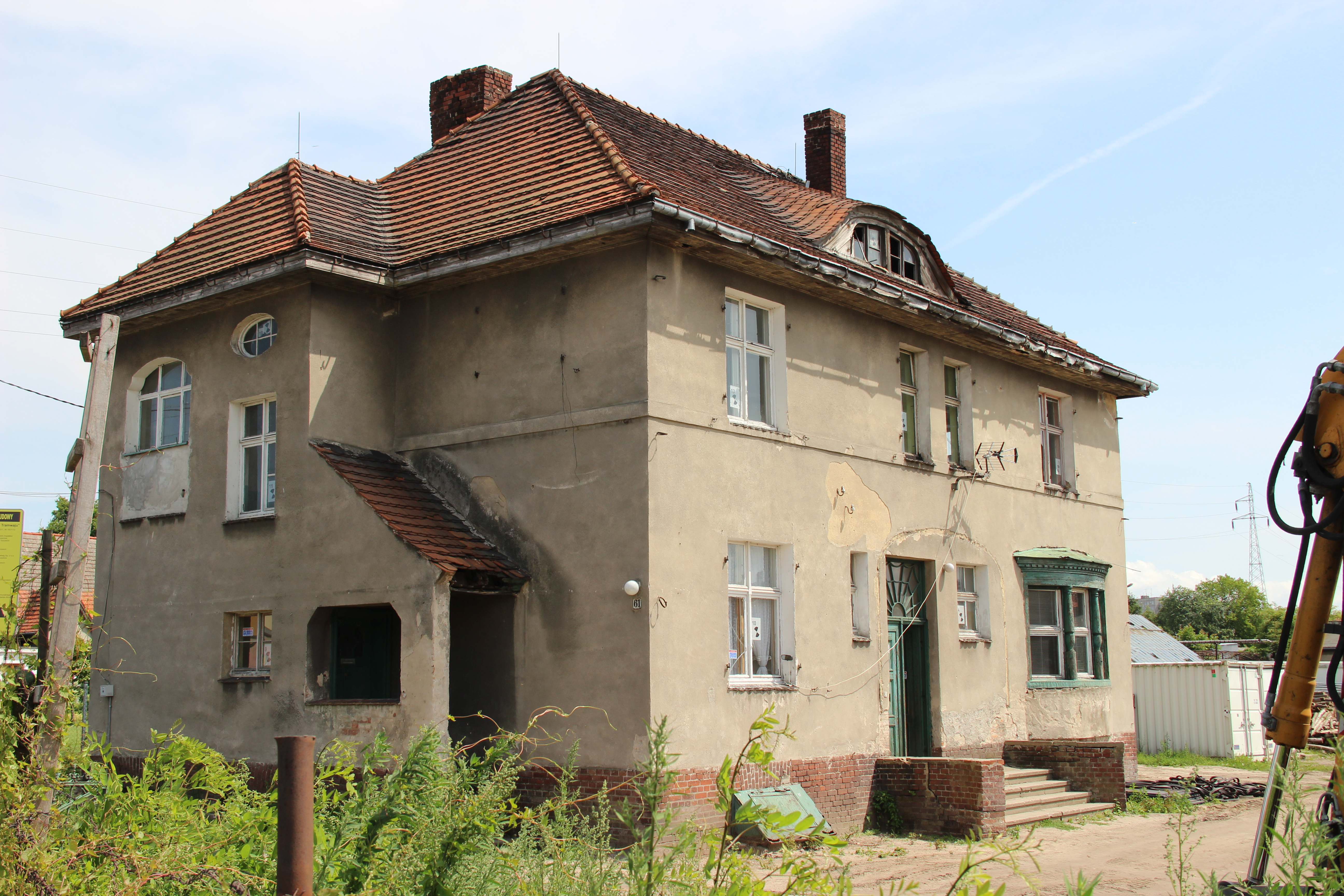 Grüneberg-Villa im Stettiner Vorort Zdroje (deutsch Finkenwalde)